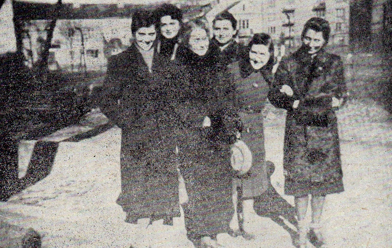 Tajne Pedagogium Ziem Zachodnich. Zdjęcie grupowe z 1943r.